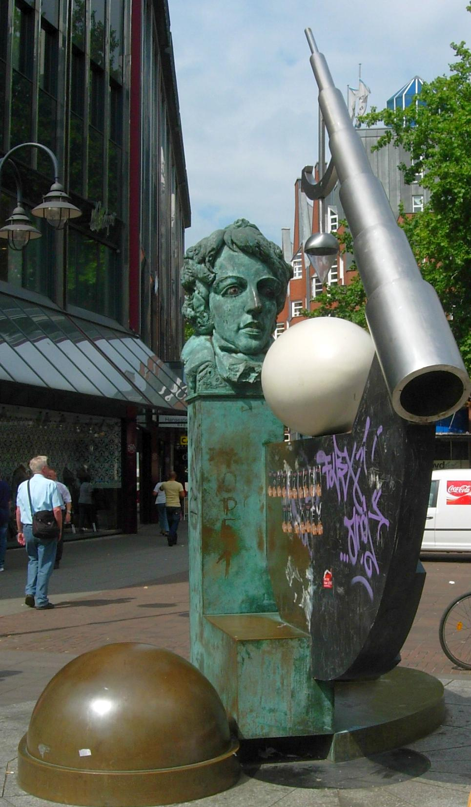 Bessel-Denkmal, Bremen, Hanseatenhof